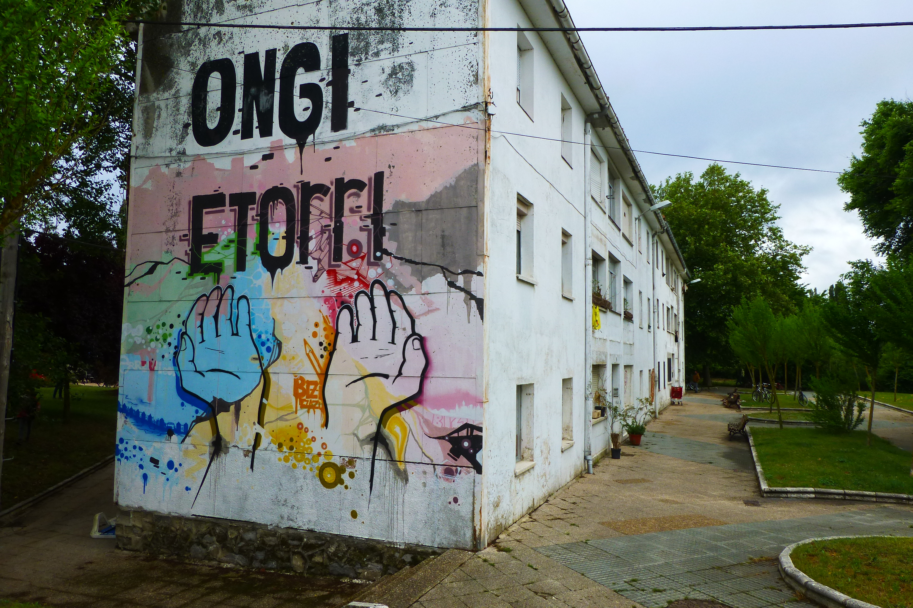 Mural de bienvenida en la fachada del primer bloque de edificos de Errekaleor, Vitoria-Gasteiz Álava, País Vasco España.